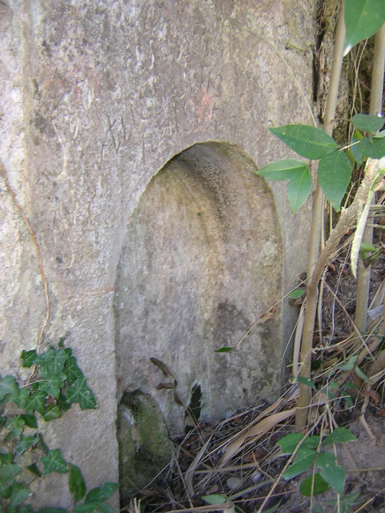 Font II de l'Església (Monistrol de Calders, Moianès)